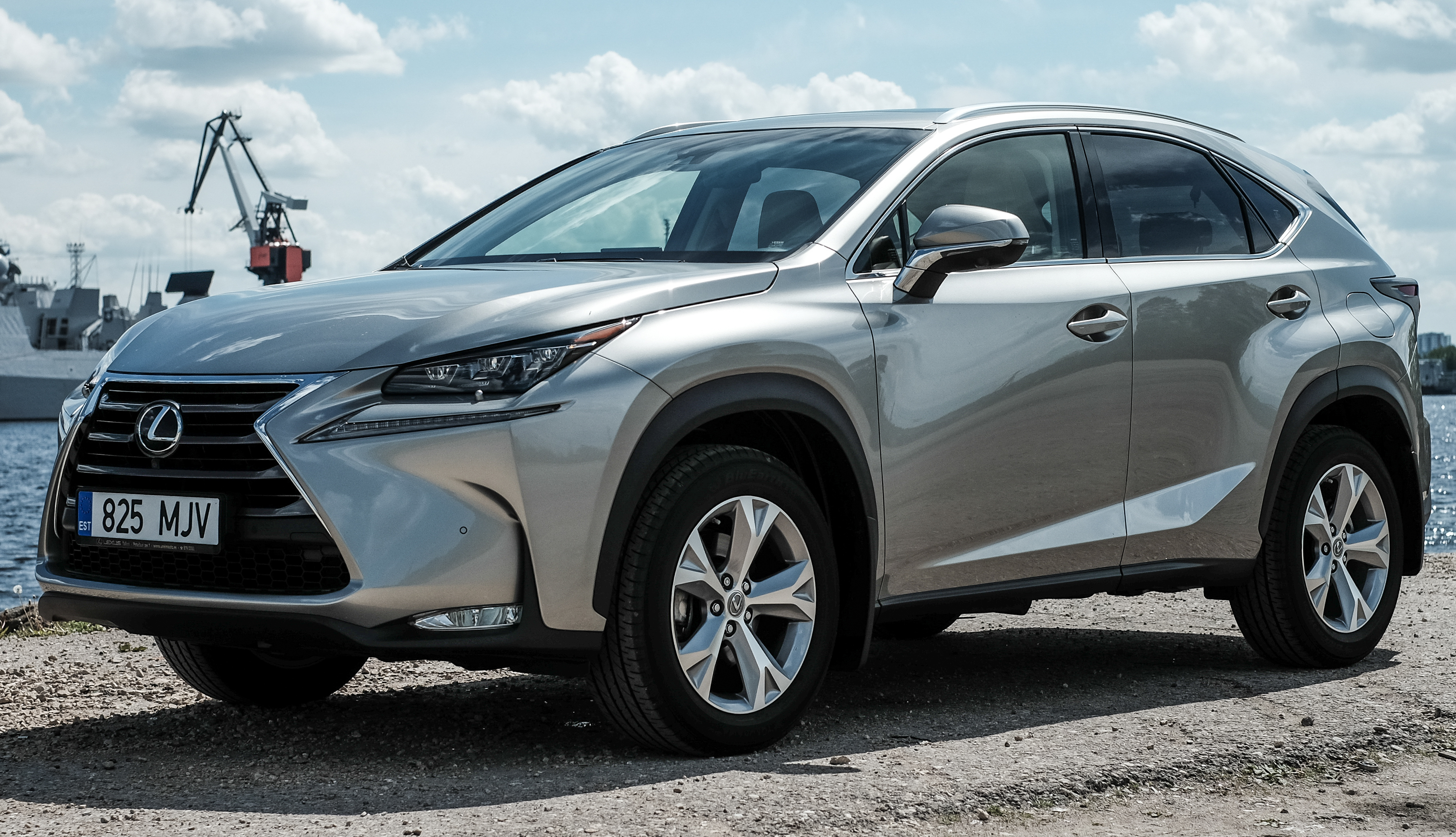 Lexus NX 200t 2015